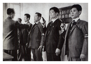 点検を受ける刑事（昭和30年代）